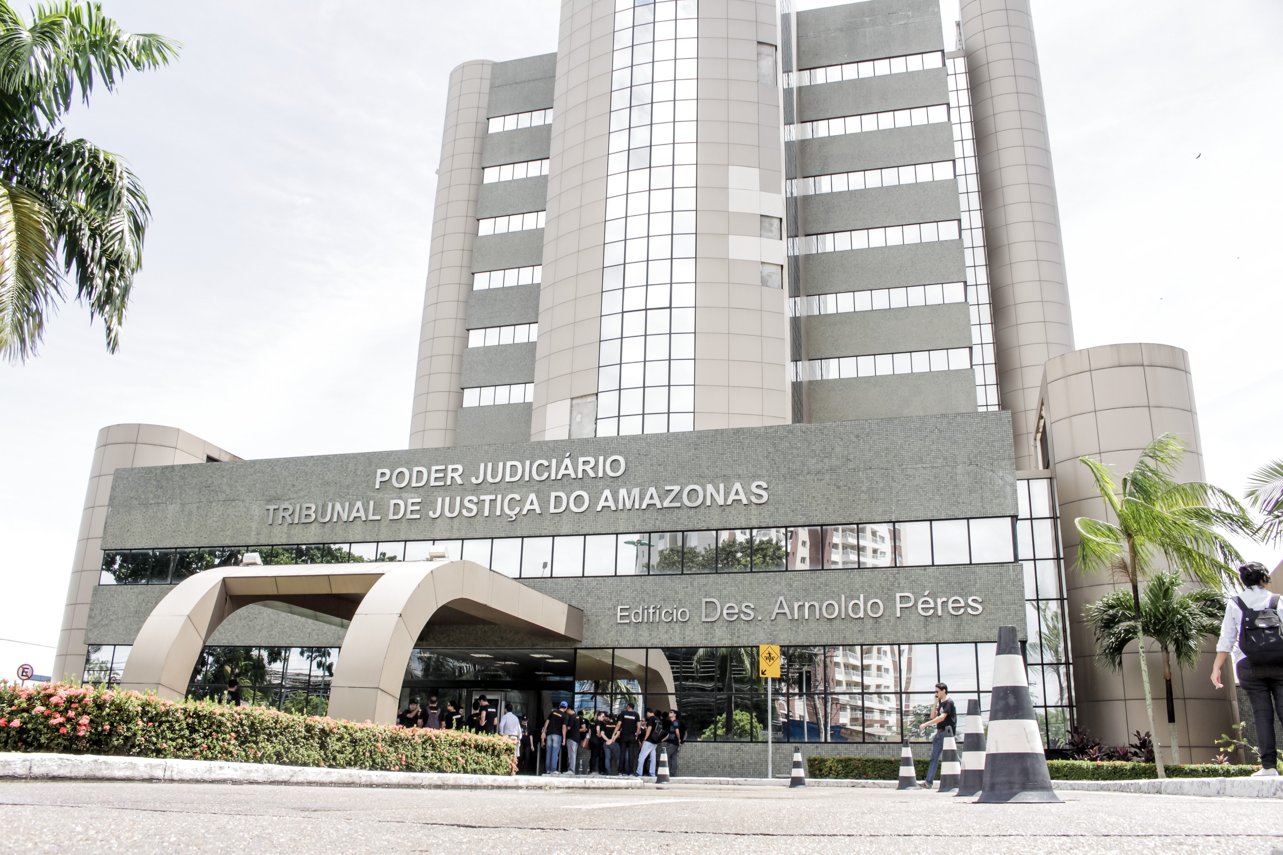 Tribunal de Justiça do Estado do Amazonas, em Manaus.